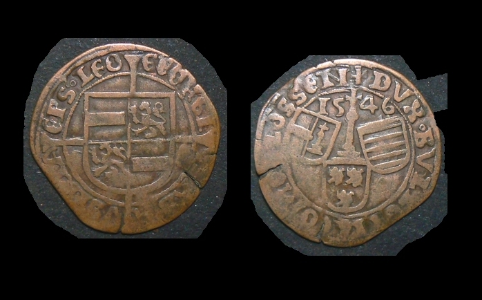 Monnaie liégeoise en bronze du Prince Evêque Georges d'Autriche.